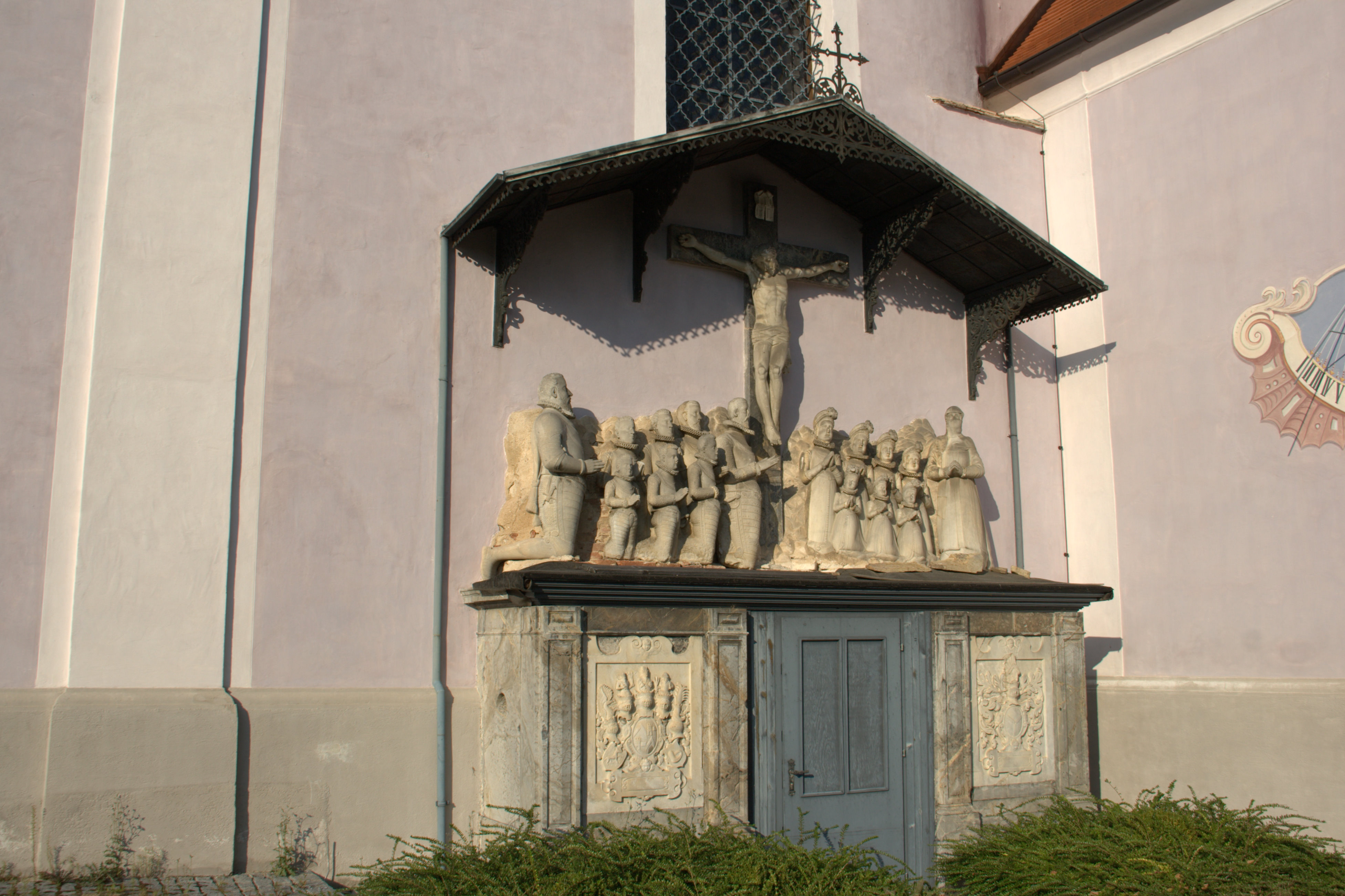 Kath. Pfarrkirche hl. Nikolaus, Detail Außenfassade, Epitaph Herberstein.